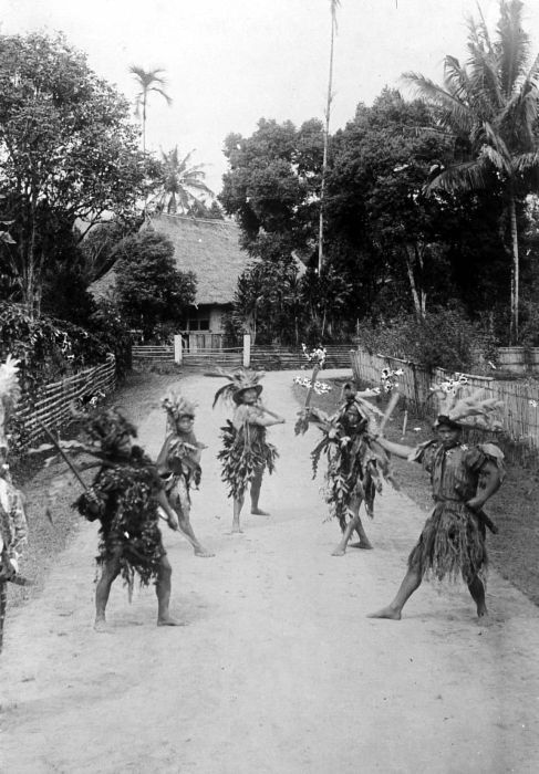 Tarian perang Kabasaran di Tondano, Minahasa